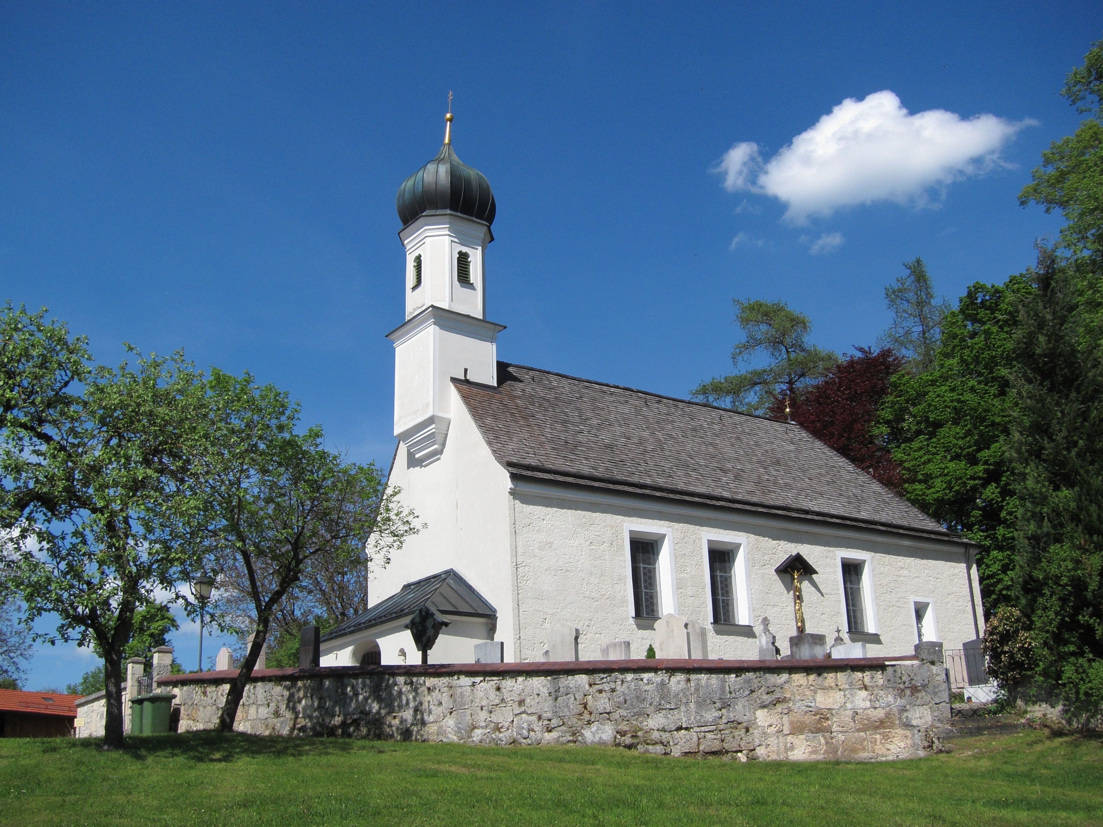 Oberelkofen, St.-Martin-Weg; Kath. Filialkirche St. Martin; im Kern 13./14. Jahrhundert, nach 1635 erweitert; Friedhof mit Tuffsteinummauerung, 17./18. Jahrhundert, mit Grabdenkmal Joseph von Hazzi (1768-1843), mit Gruftkapelle v. Rechberg-Rothenlöwen, um 1901, und gräflichem Friedhof mit Grabdenkmälern, 2. Hälfte 19. und 20. Jahrhundert; mit Ausstattung.